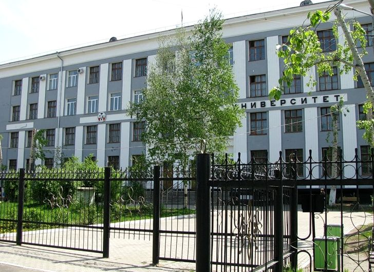 Корпус КнАГТУ